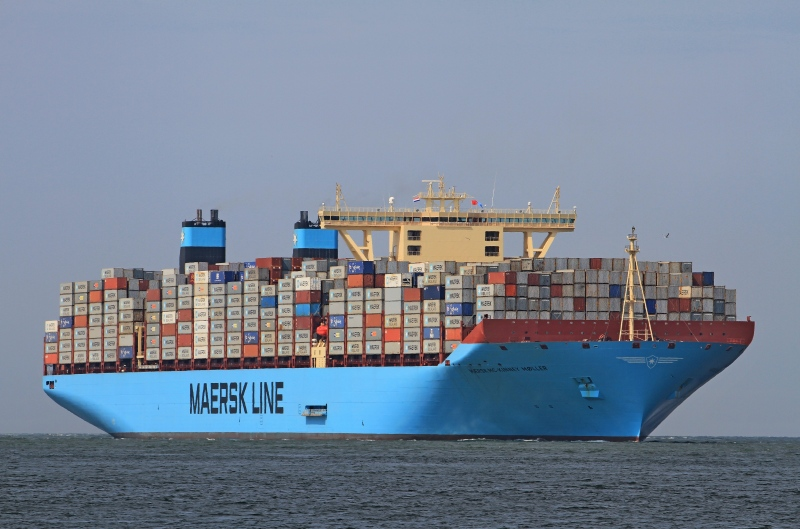 Tripple E-Class M/V "Mærsk Mc-Kinney Møller"